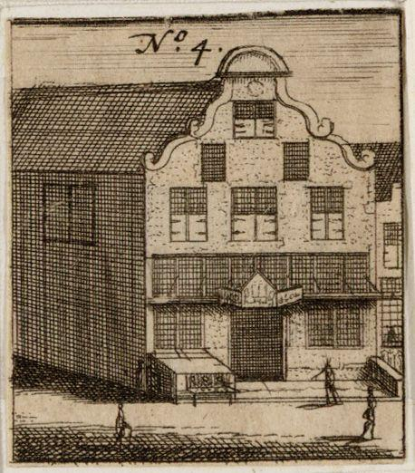 Beschrijving Het Kistenmakerspand op Kalverstraat 183 met links de ingang van de Olieslagerssteeg Oorspronkelijk de kapel van het Sint Jorishof (Leprozenhuis) dat, na eerste een proveniershuis te zijn geweest, in 1624 verbouwd werd en werd verhuurd aan de overlieden van het Sint Jozefgilde ten behoeve van het ambacht van de kistenmakers en schrijnwerkers. Het pand is weergegeven in de gedaante die het had gekregen in 1624. Techniek: ets. Documenttype prent Vervaardiger Verheyden, Jacobus Collectie Collectie Stadsarchief Amsterdam: tekeningen en prenten Datering 1723 Geografische naam Kalverstraat Inventarissen Afbeeldingsbestand 010097002860